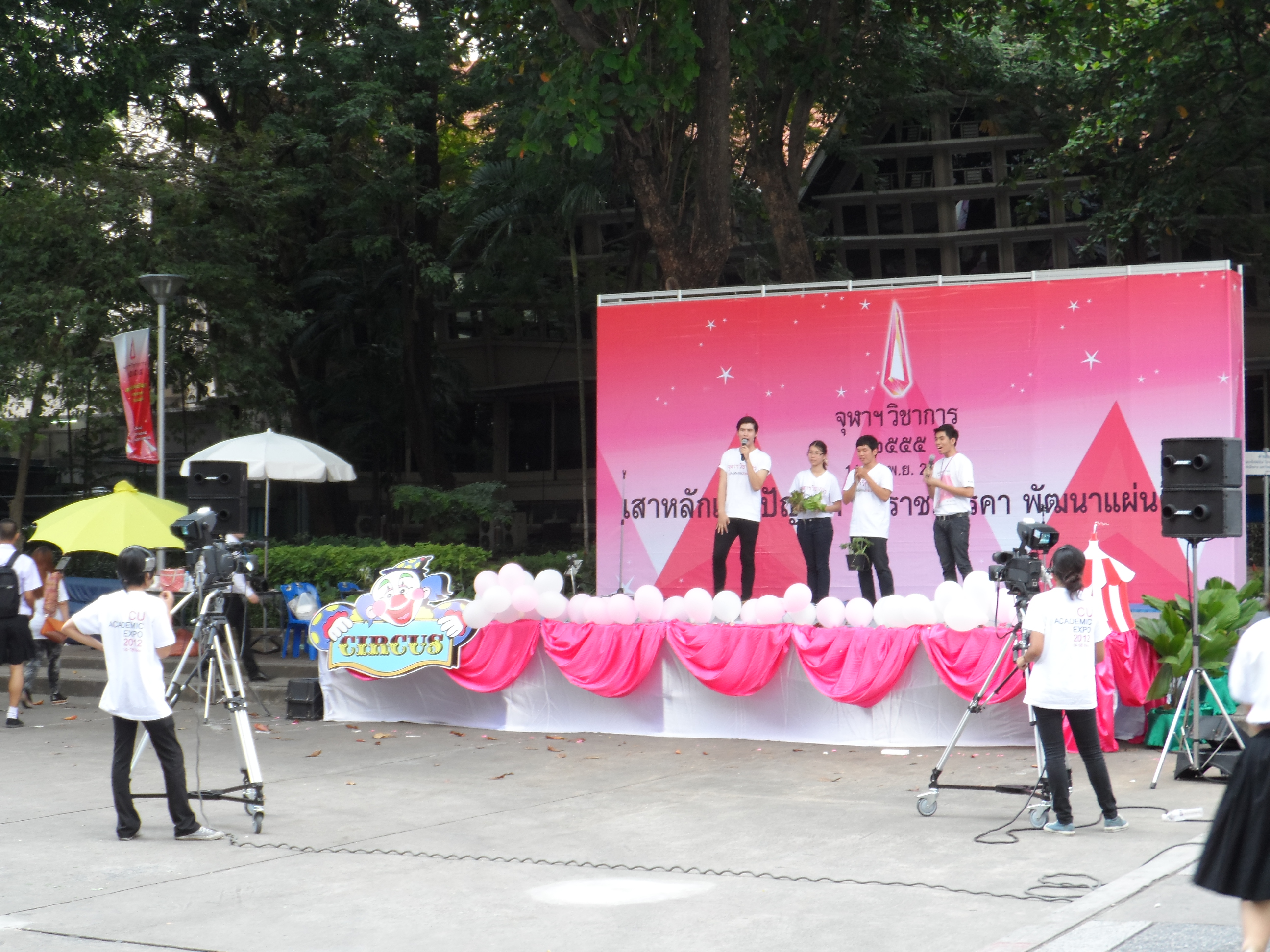 เวทีกลางงานจุฬาวิชาการ 2555